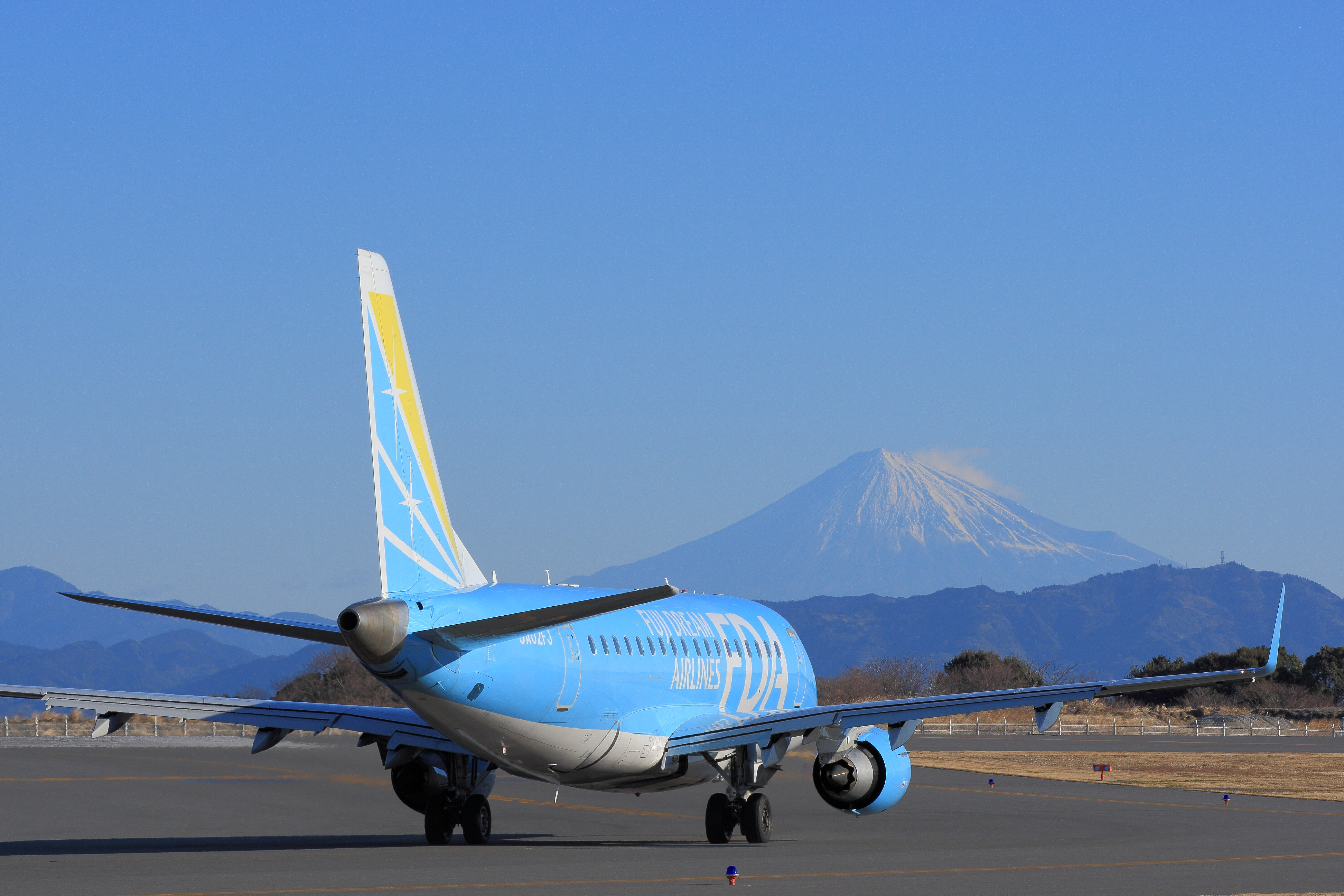 静岡空港で撮影された、フジドリームエアラインズ2号機。背景の富士山は同社シンボルマークのモチーフにもなっている。